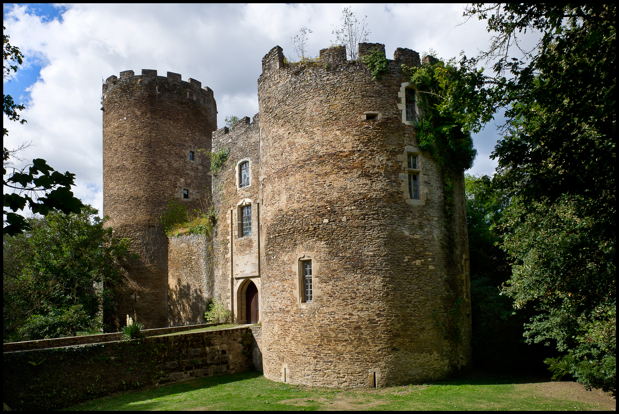 Château de Châteaubrun, (Inscrit, 1926)